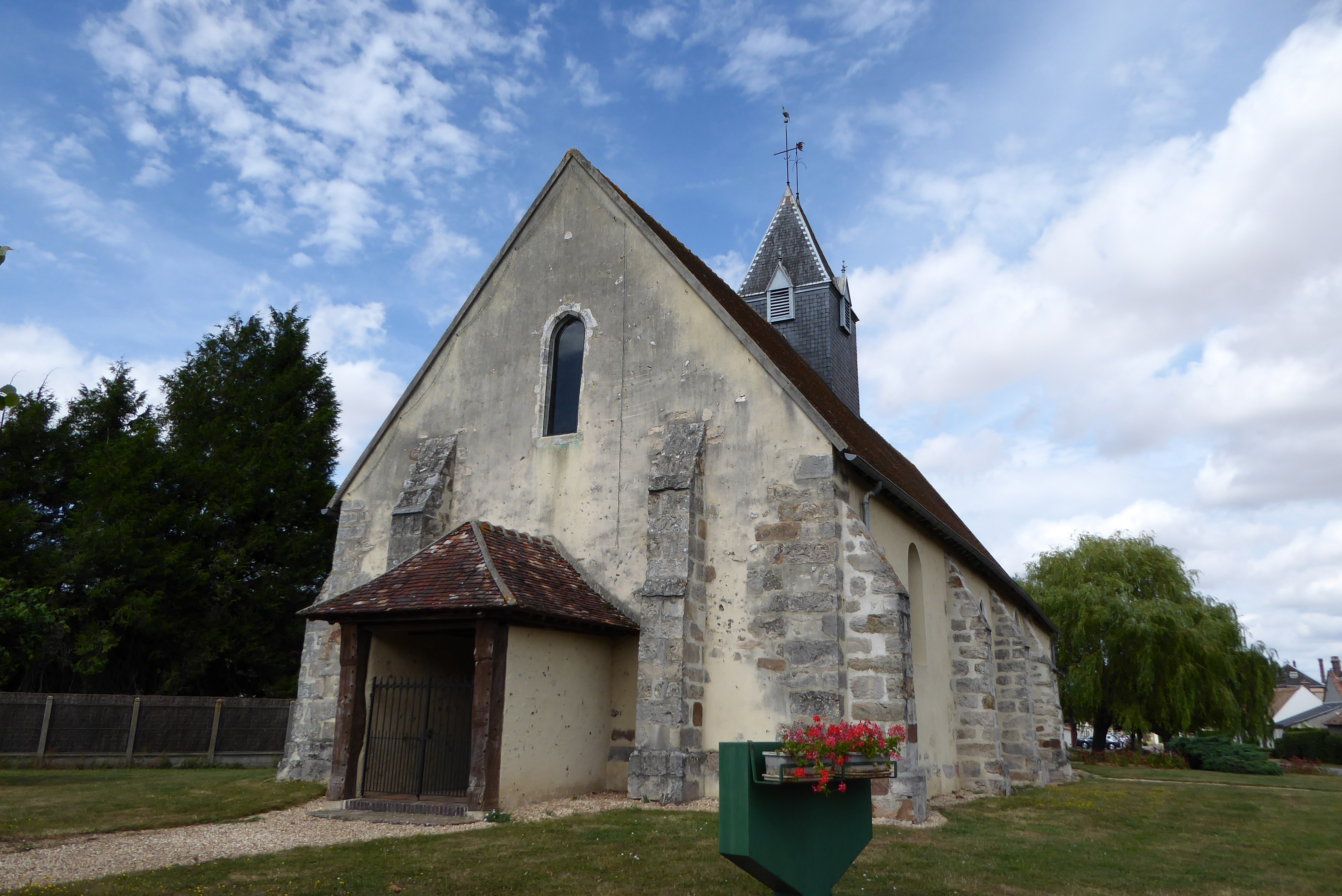 Église Saint-Martin, Germainville, Eure-et-Loir (France).